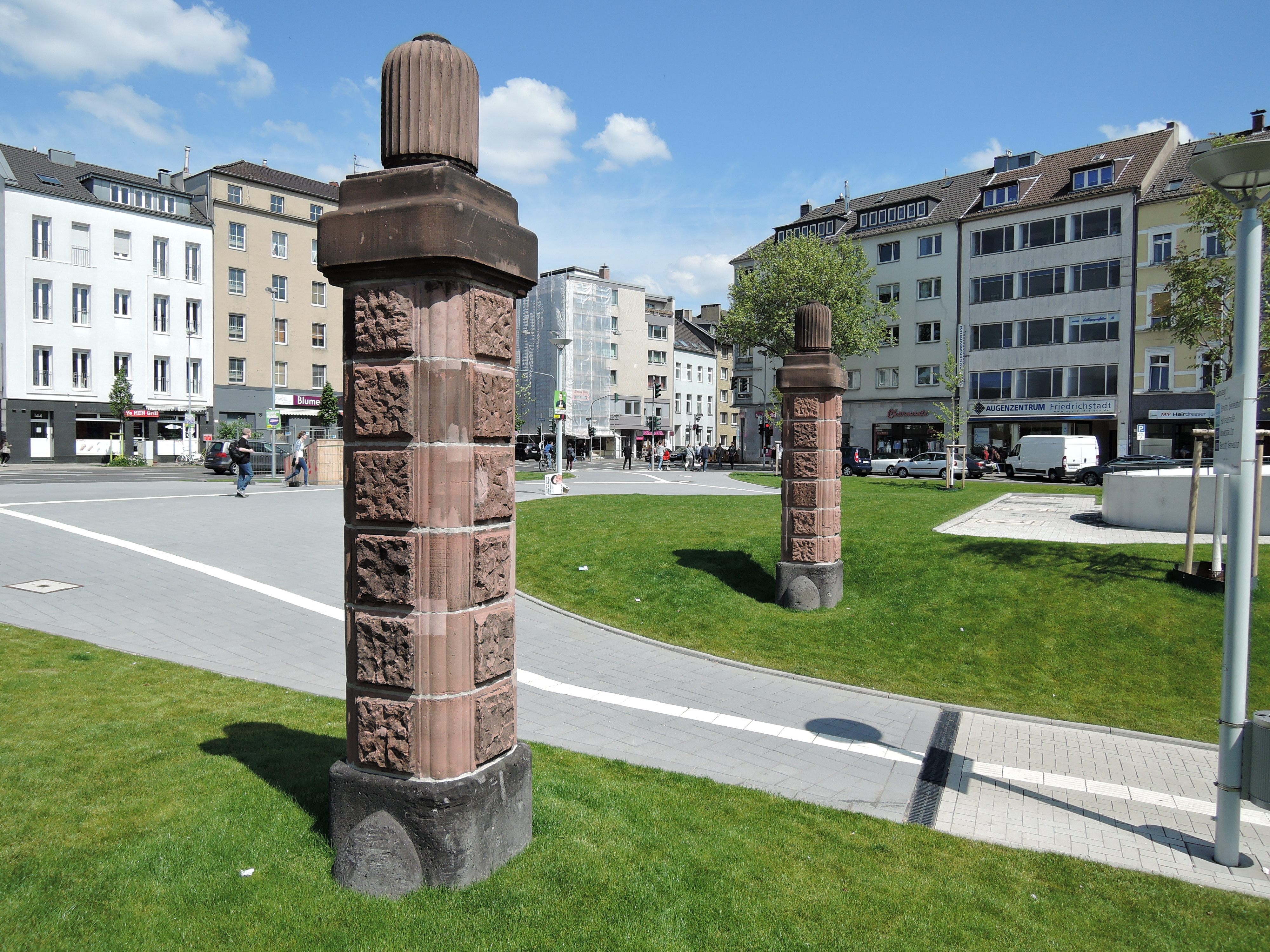 Bahnhof Düsseldorf-Bilk